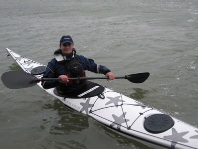 Sea Kayak Coach Mark Tozer